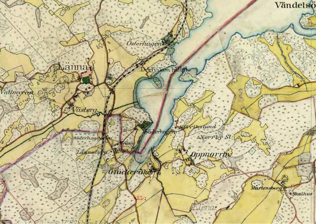 Länna med omgivning på Häradskartan, 1901-06